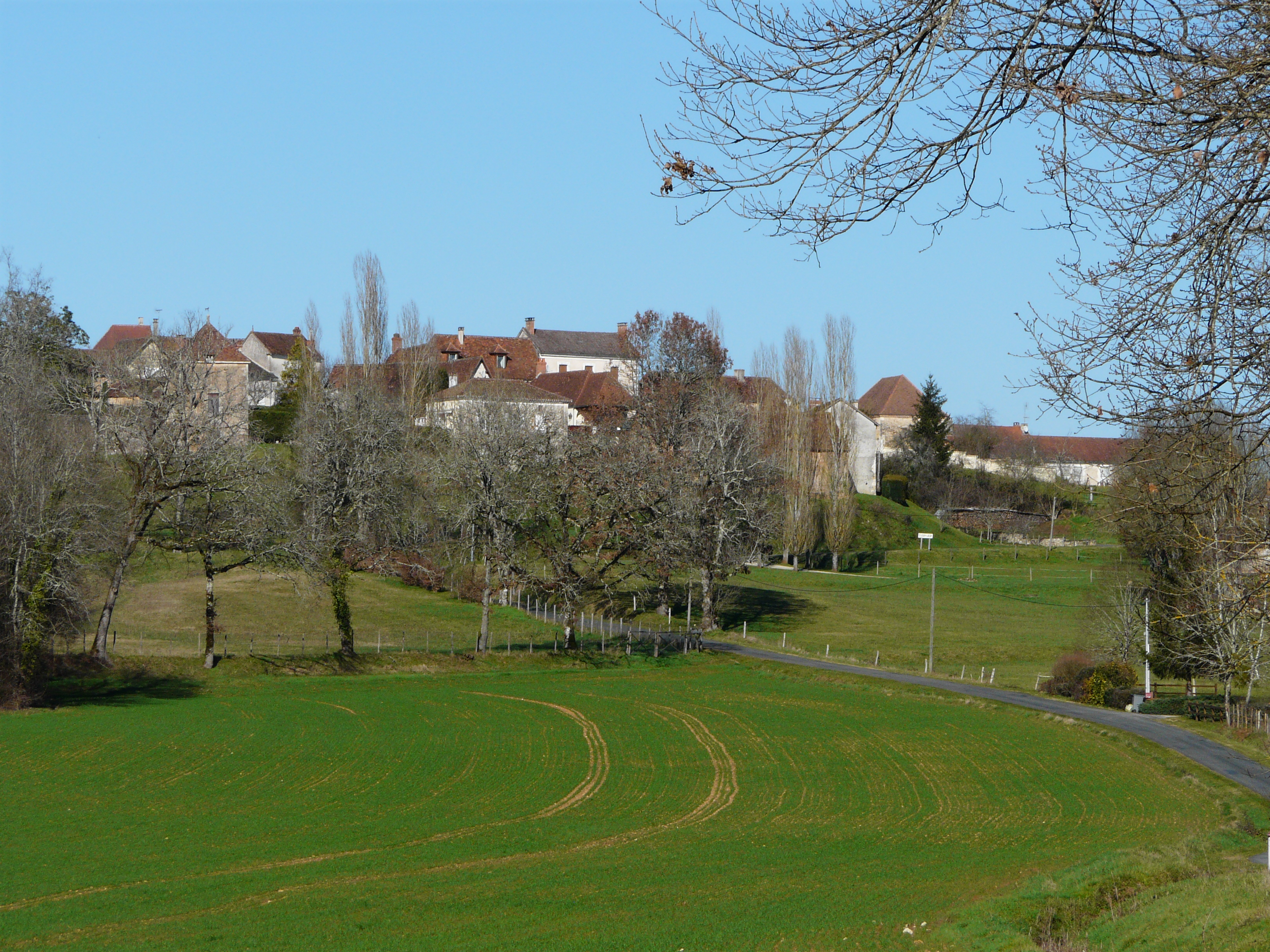 Le village de Saint-Jory-las-Bloux, Dordogne, France.